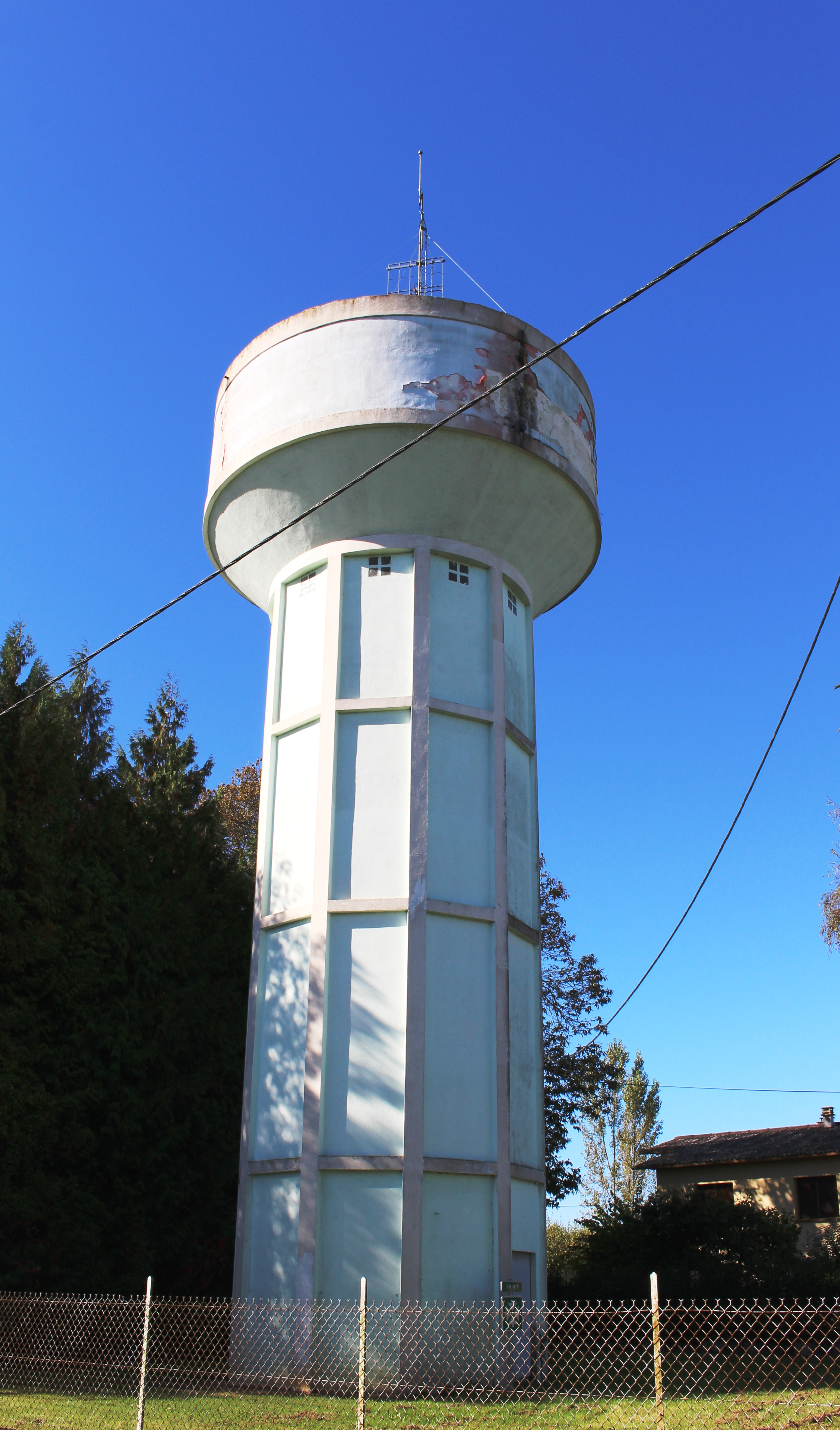 Château d'eau de Cantaous (Hautes-Pyrénées)